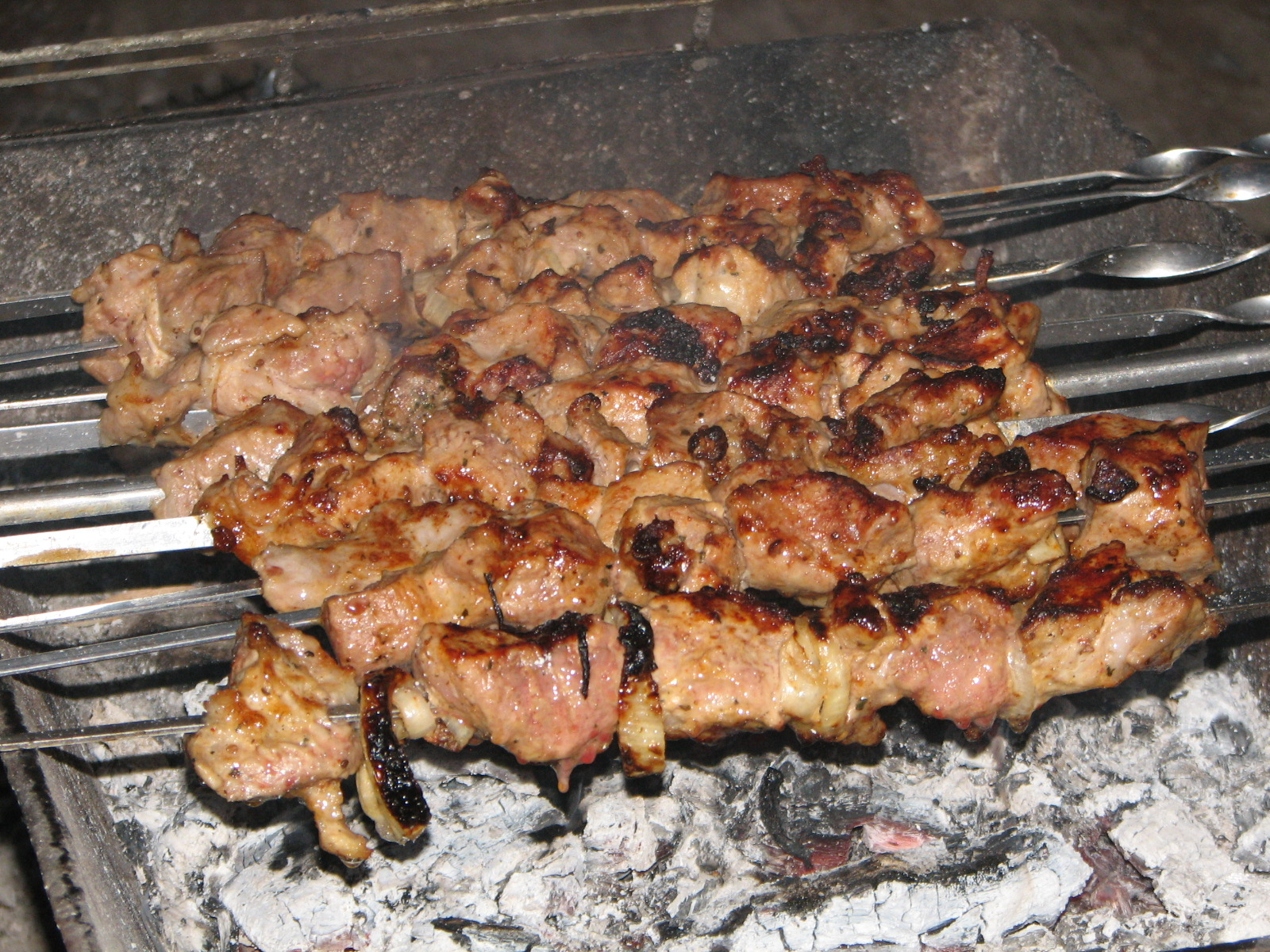 Шашлык